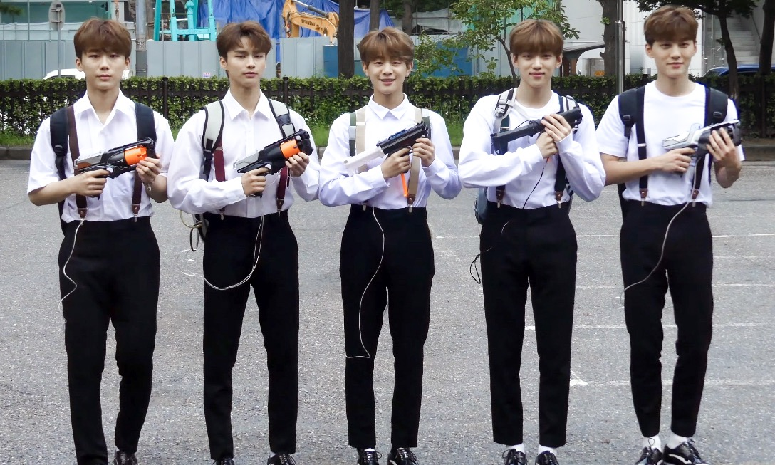 8월9일 오전 서울시 영등포구 여의도 KBS 신관 공개홀에서 열린 '뮤직뱅크(MUSICBANK)' 리허설에 참석하기 위해 JBJ95(켄타, 상균), 동키즈(원대, 경윤, 문익, 재찬, 종형)가 출근하고 있다. JBJ95 #켄타 #상균 #DONGKIZ #동키즈 #원대 #경윤 #문익 #재찬 #종형 #MUSICBANK #뮤직뱅크 #출근길 #뮤뱅출근길 JBJ95, 켄타, 상균, DONGKIZ, 동키즈, 원대, 경윤, 문익, 재찬, 종형, MUSICBANK, 뮤직뱅크, 출근길, 뮤뱅출근길